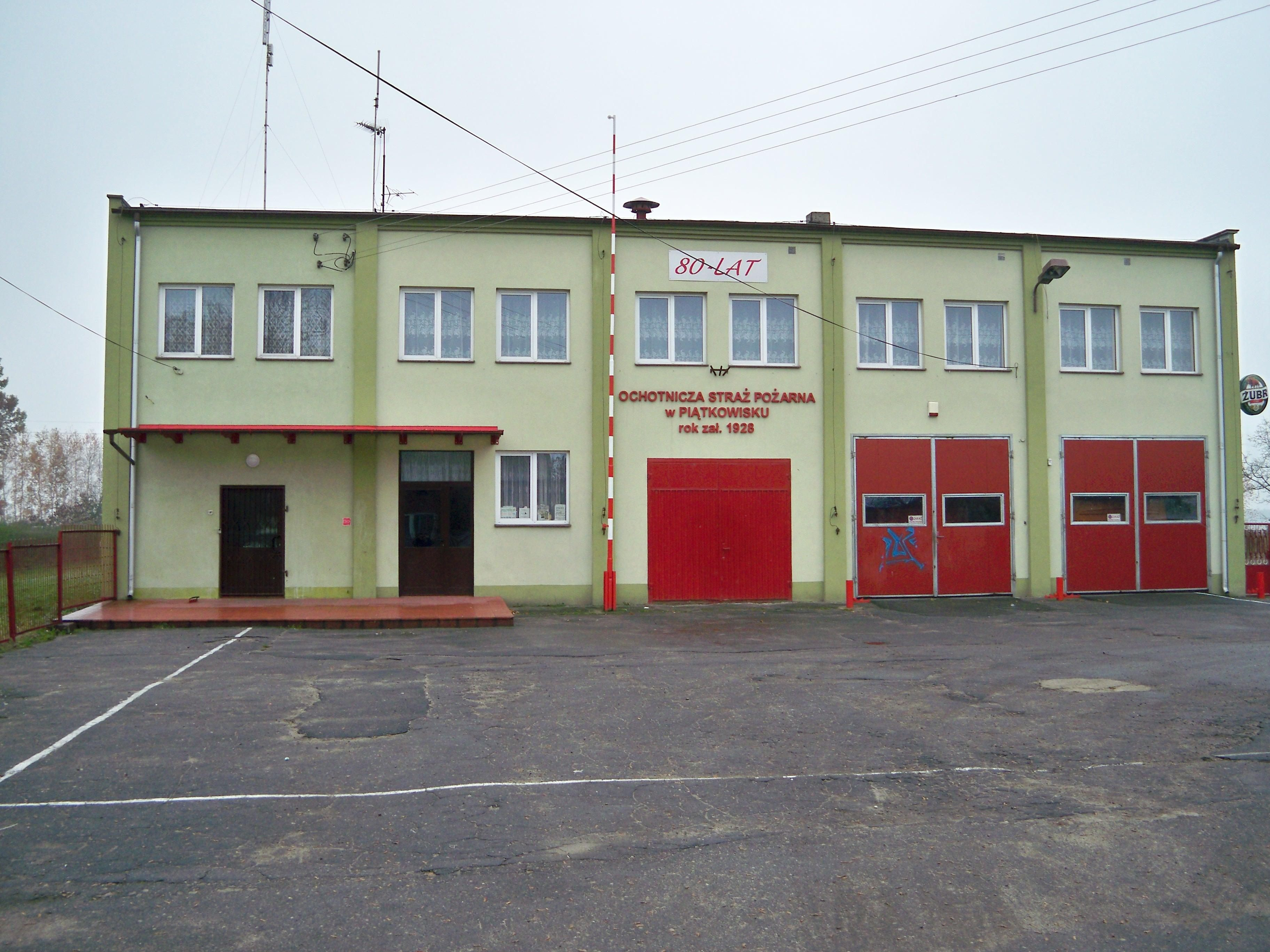 bardzo dobrej jakości zdjęcie OSP Piątkowisko